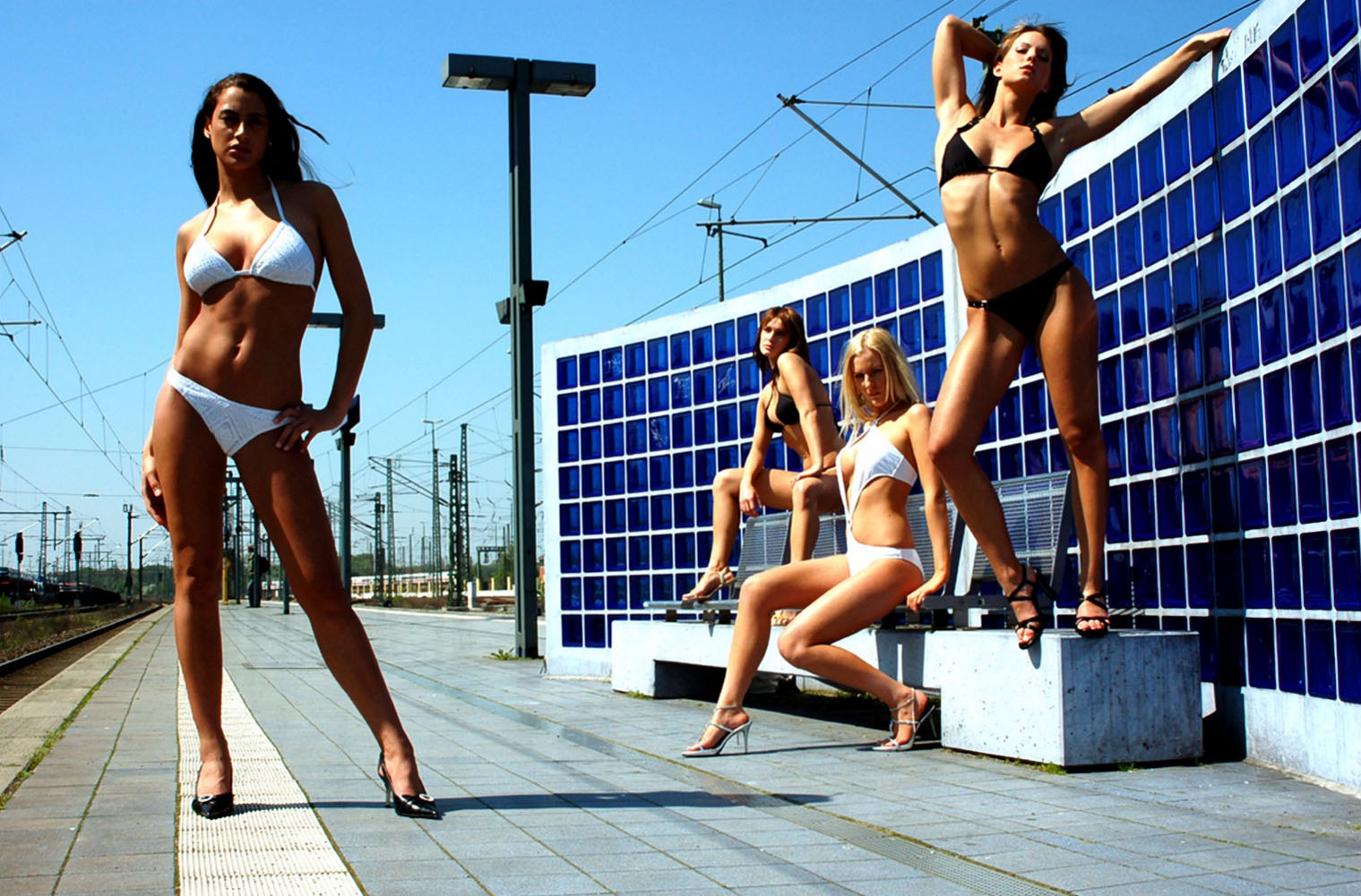 Modefotografie